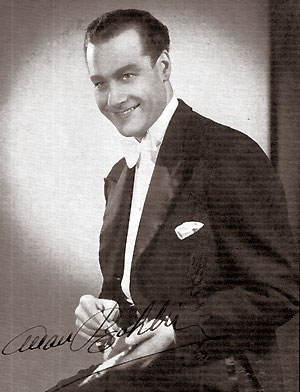 Allan Bohlin